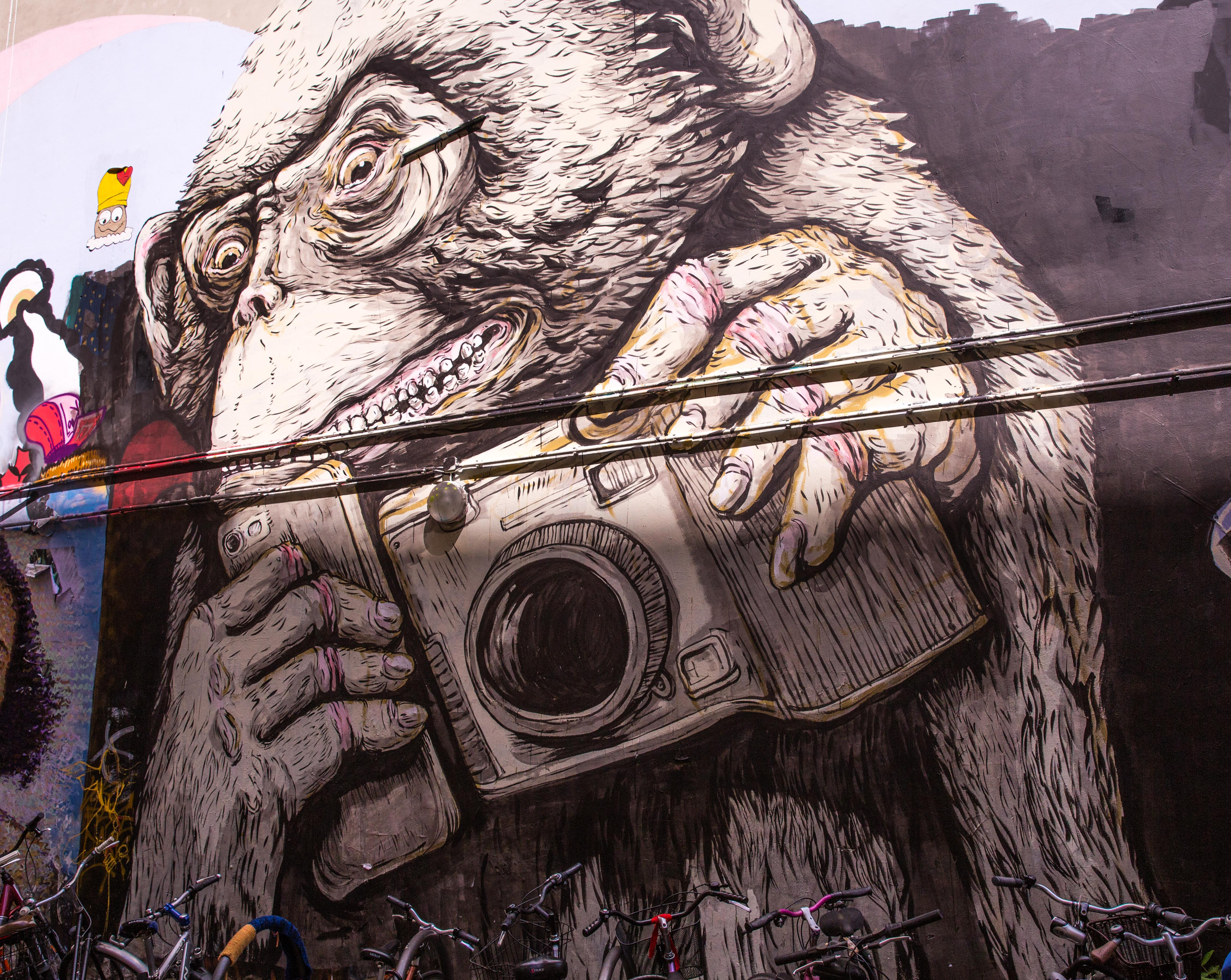 Graffiti in einem HofThis is a photograph of an architectural monument.